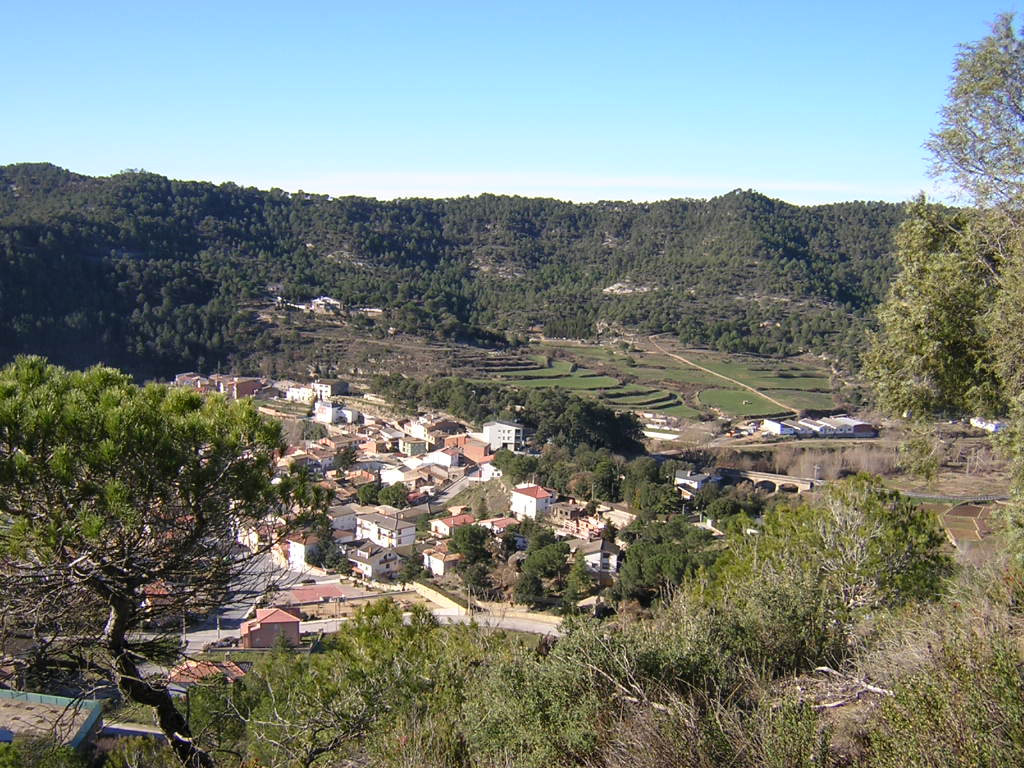 La Llandriga (Monistrol de Calders, Moianès)